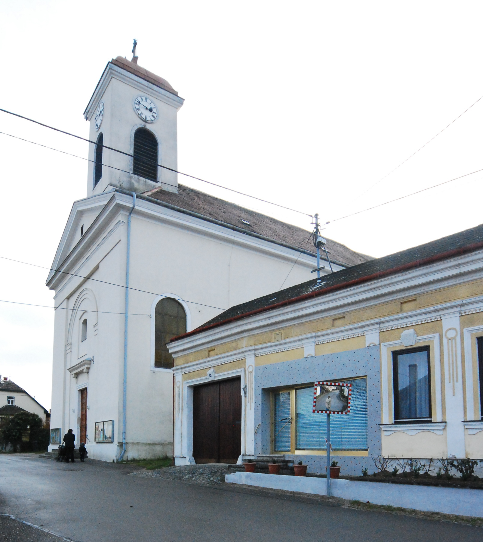 katholische Pfarrkirche Maria Heimsuchung